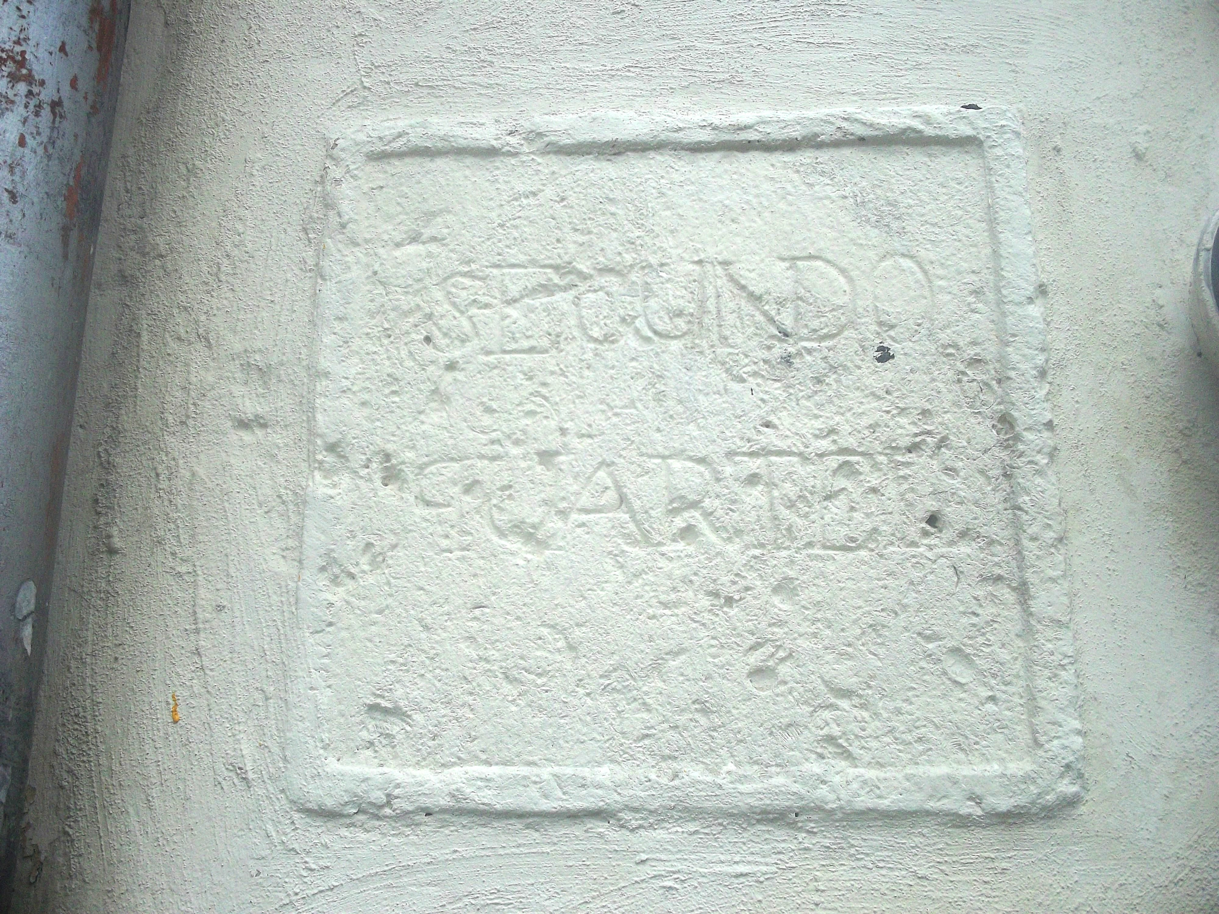 Piedra grabada que señala el Segundo Cuartel, Mérida, Yucatán.